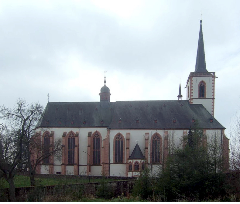 Klausen Kirche